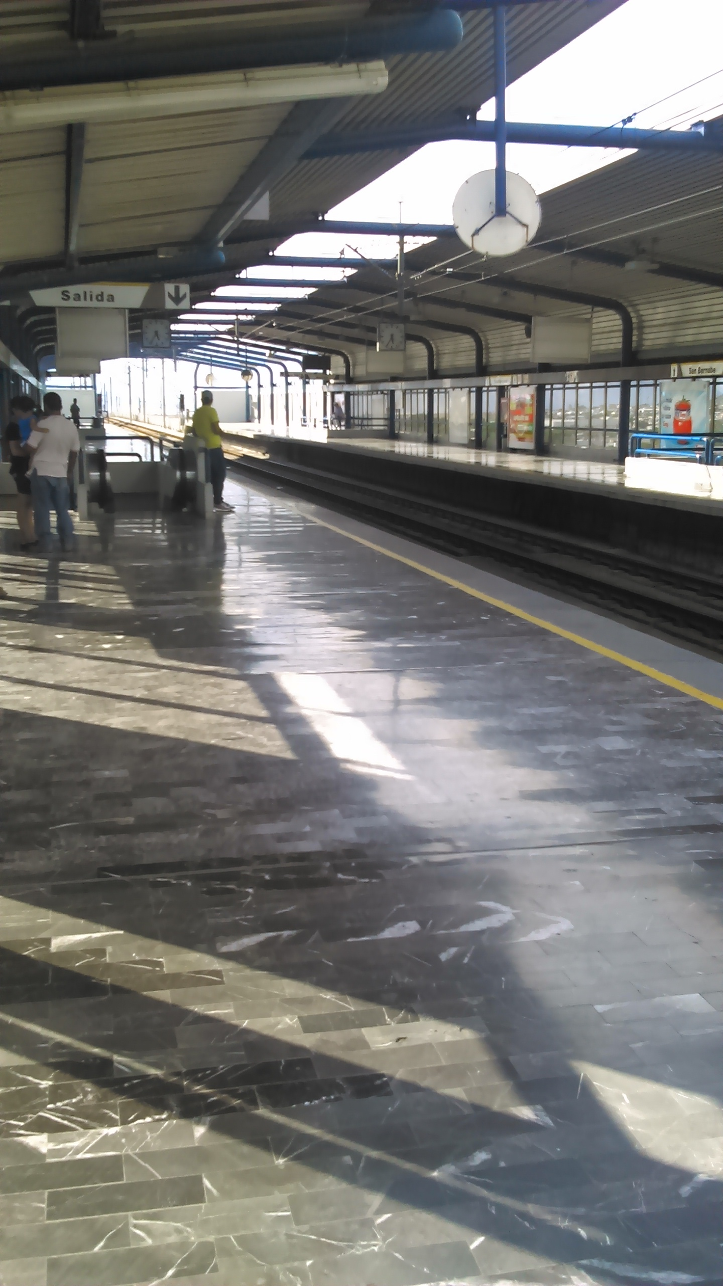 Andén de la estacion San Bernabé en Monterrey